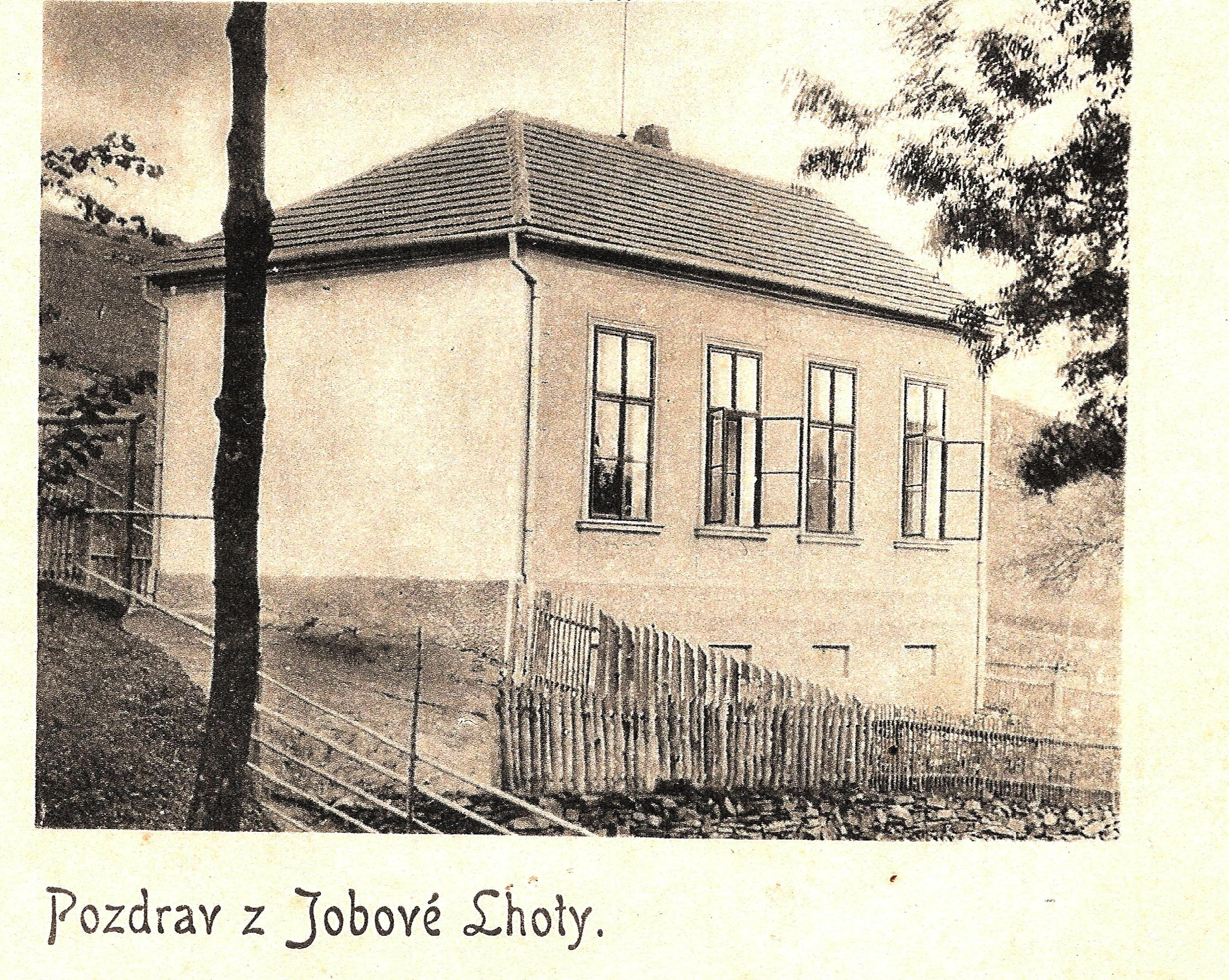 Původní škola Jobové Lhoty